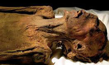 Pentawere fils de Ramses III celui qui voulu s`emparer du Règne de son Père.